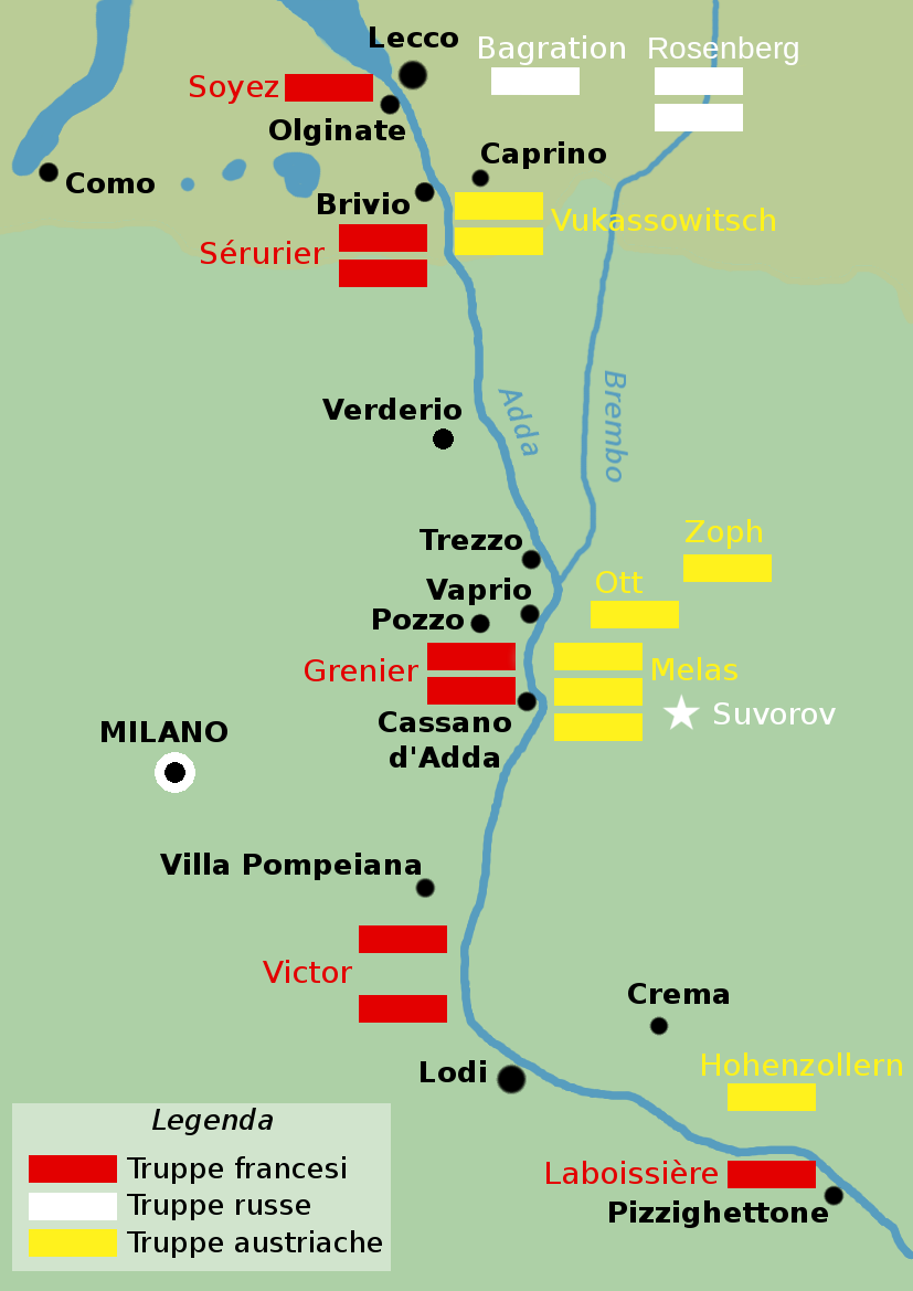 Truppe in campo attorno al 24 aprile 1799, al momento dell'attacco sull'Adda della Campagna italiana di Suvorov.